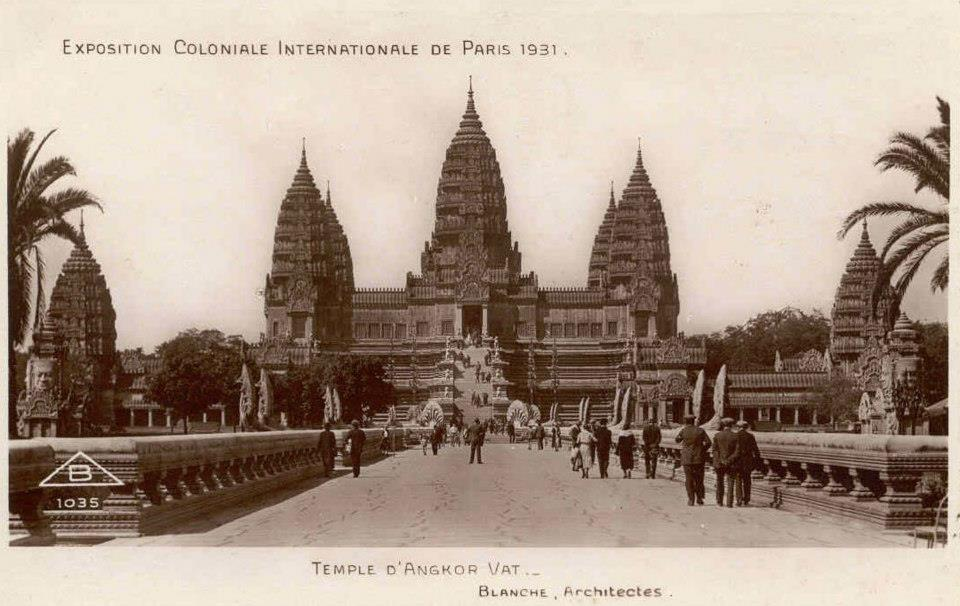 Макет храма Ангкор-Ват на Парижской колониальной выставке днем